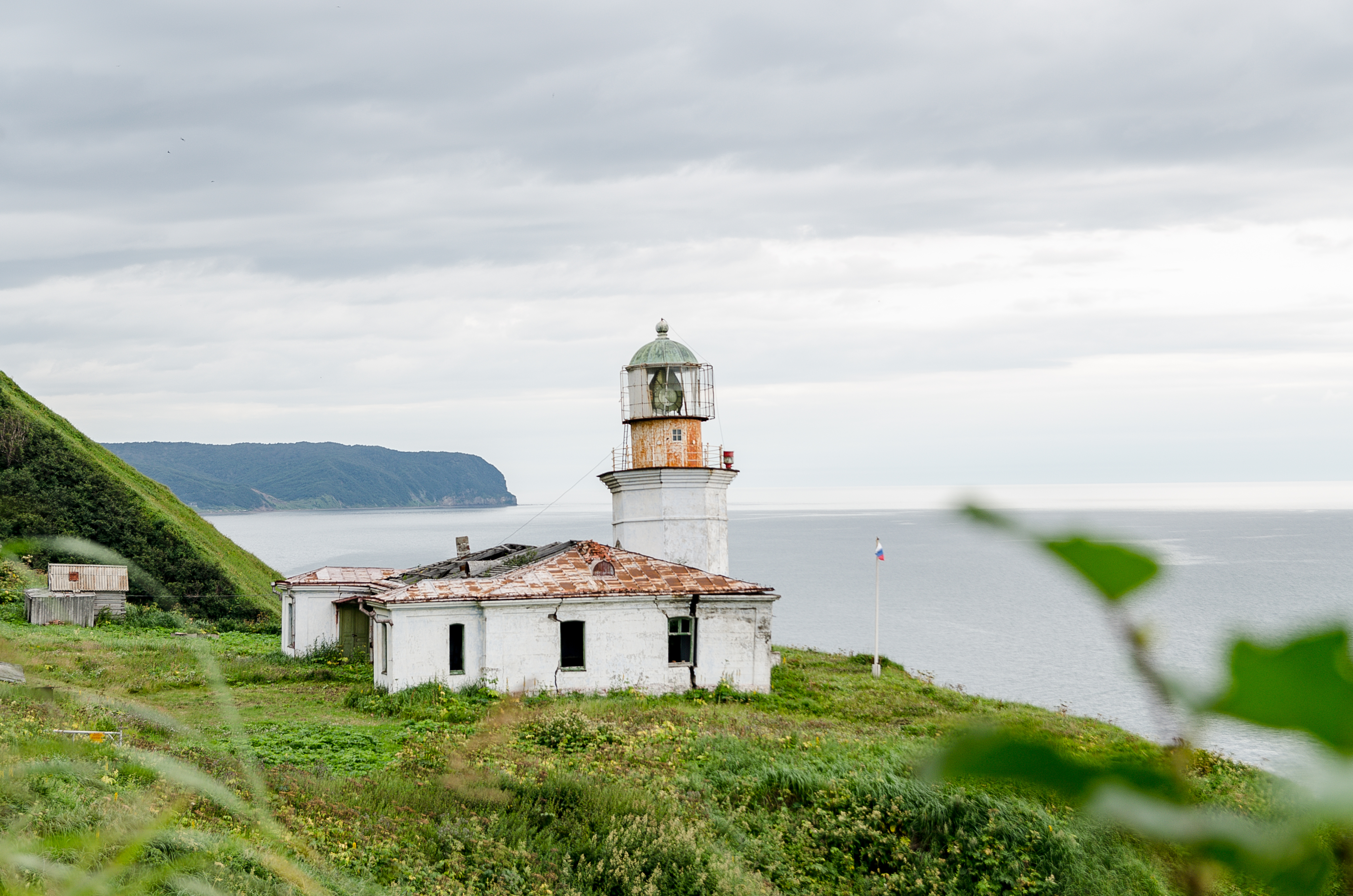 Маяк на мысе Жонкьер - один из старейших на Дальнем Востоке, на котором отбывали каторгу восставшие матросы Иннокентьевской батареи Владивостока: юж.окраина города, Александровск-Сахалинский, Александровск-Сахалинский район, Сахалинская область